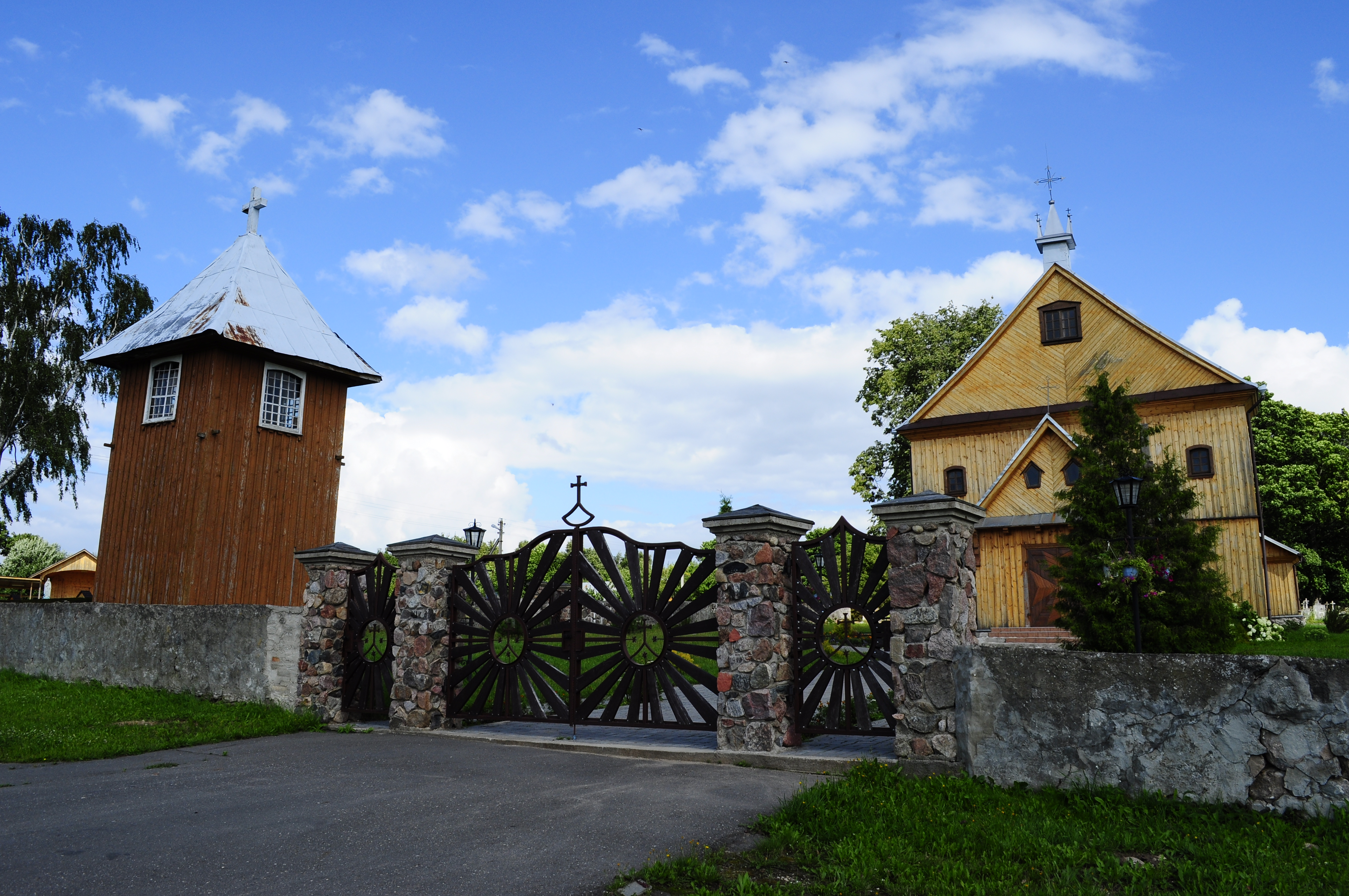 Беларуская (тарашкевіца): Гудагай. касьцёл Маці Божай Шпаклернай This is a photo of Belarusian heritage monument. Reference number: 412Г000042 ( WLM)